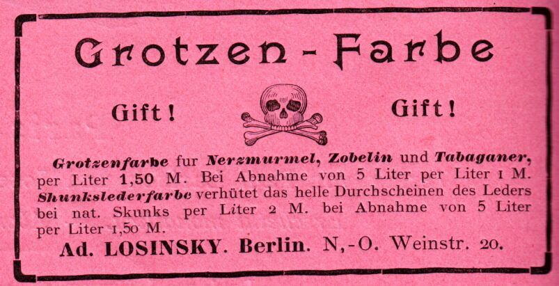 Advertisement 'fur grotzen-dye' / Anzeige in Kürschner-Fachzeitung